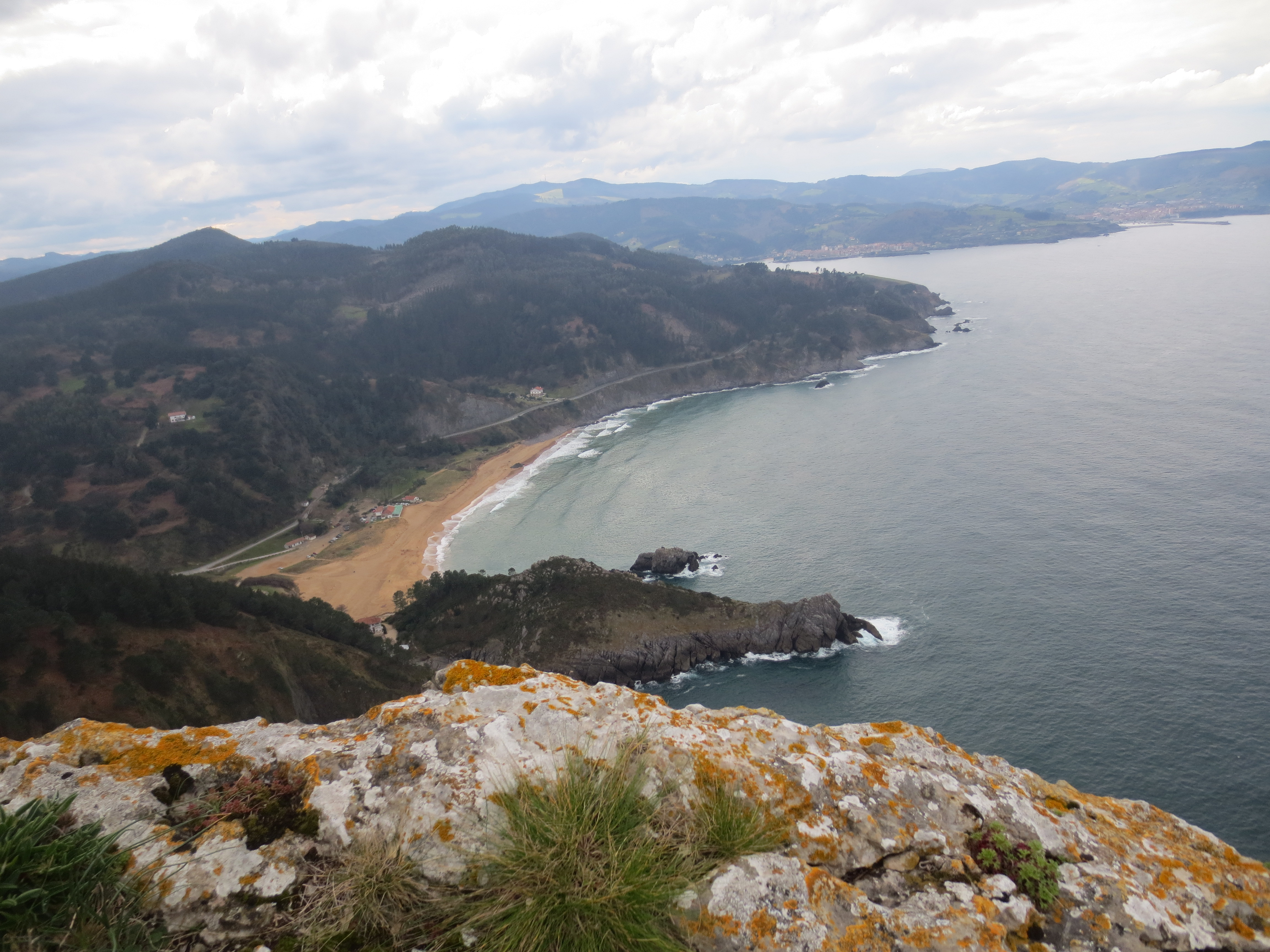 Laga hondartza Talaia mendi tontorretik